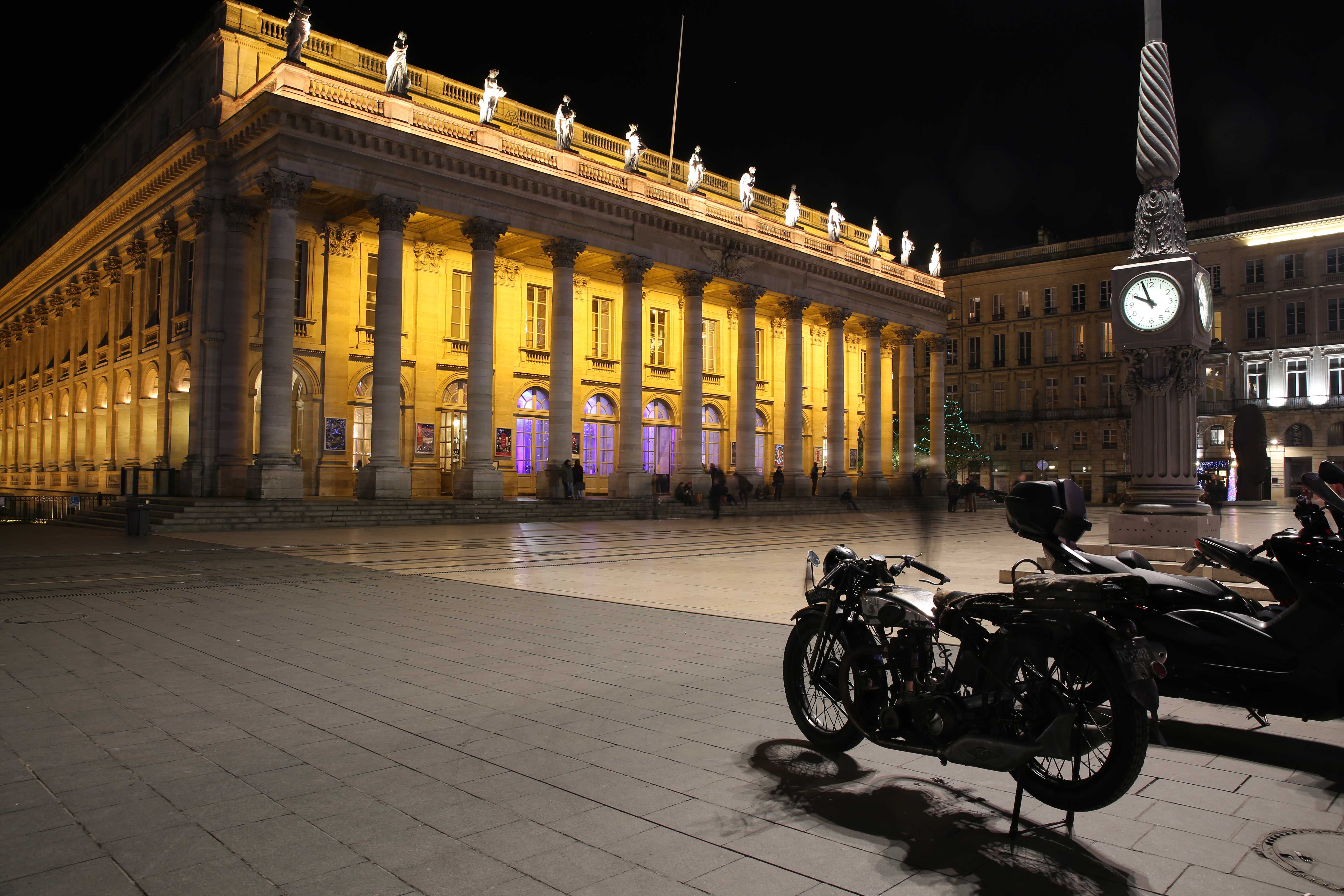 Grand Théatre de Bordeaux de nuit avec motocyclette Terrot stationnée devant.